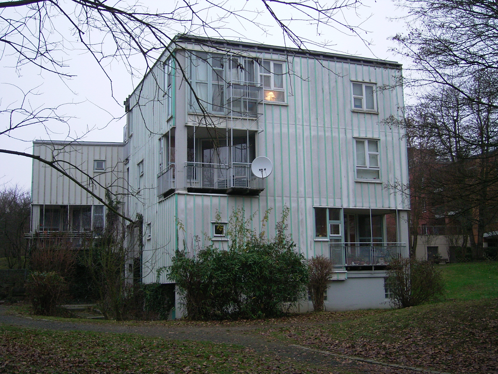 documenta urbana Wohngebäude in Kassel 1979-1982. Teil der „Wohnschlange“